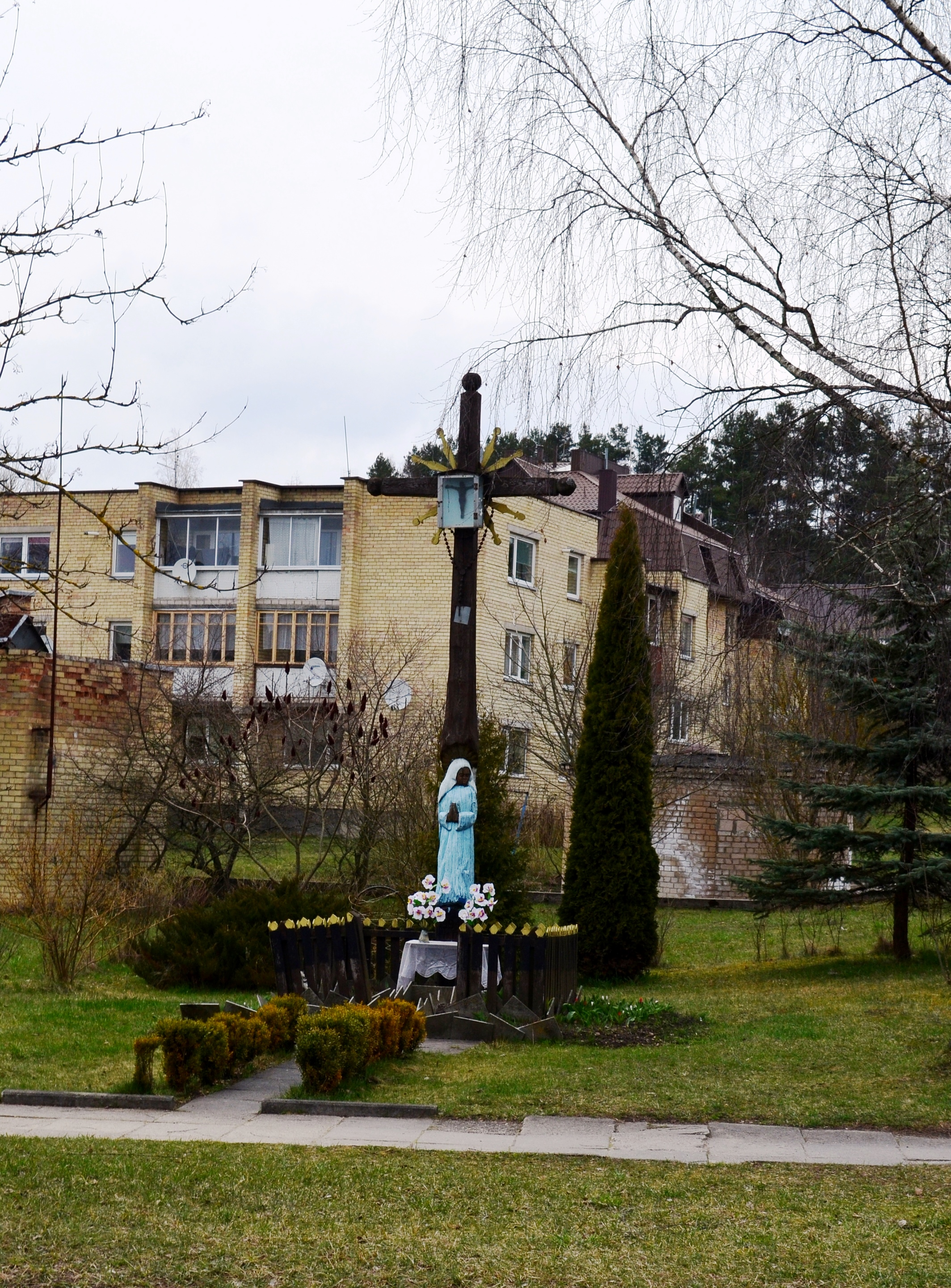 Medinis kryžius Bukčiuose, Vilnius